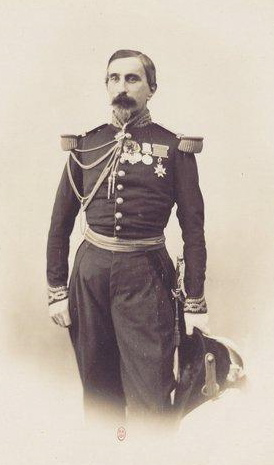 Portrait du colonel Reille